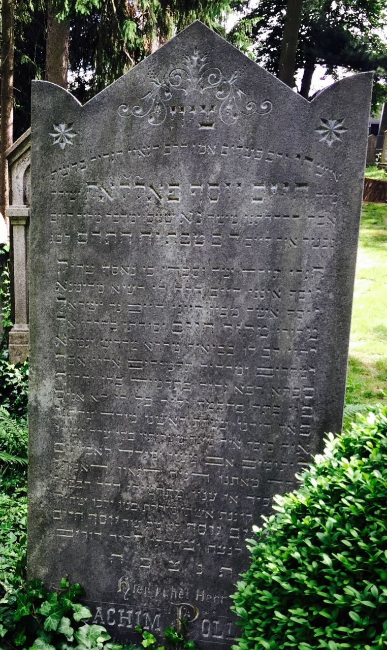 The kever of rabbi Hayyim Joseph Pollak at the Jewish Cemetery in Třebíč.